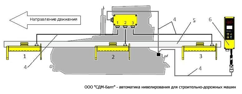 СДМ. Расположение приборов следящей системы нивелирования Big Sonic-Ski "Большая лыжа" на асфальтоукладчике: 1, 2, 3 - ультразвуковые датчики; 4 - спиральные кабели; 5 - несущая балка; 6 - пульт управления; 123 - сумматор. По похожим схемам автоматика нивелирования устанавливается и на другие дорожные машины.